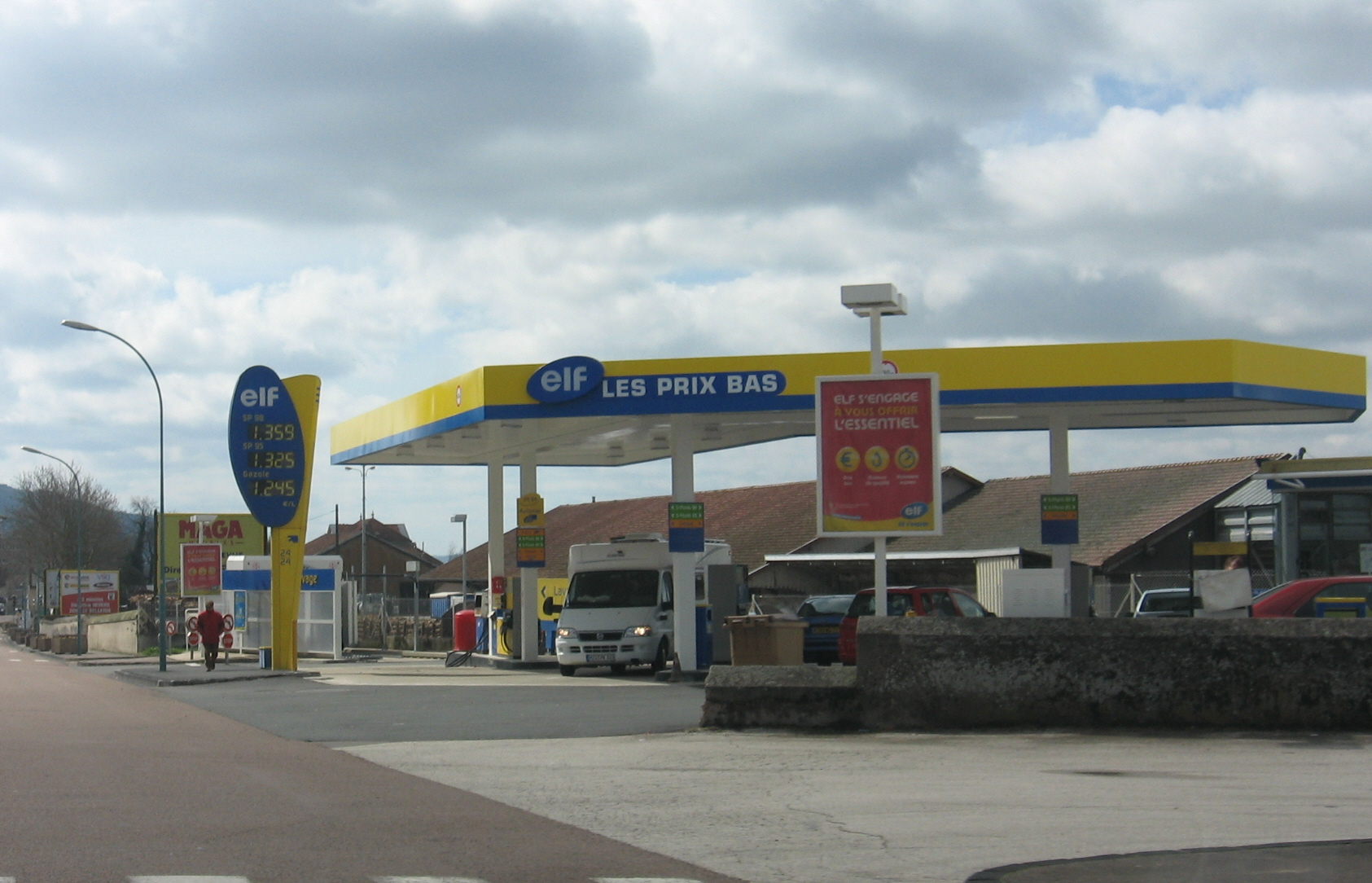 ELF, Côte-d'Or